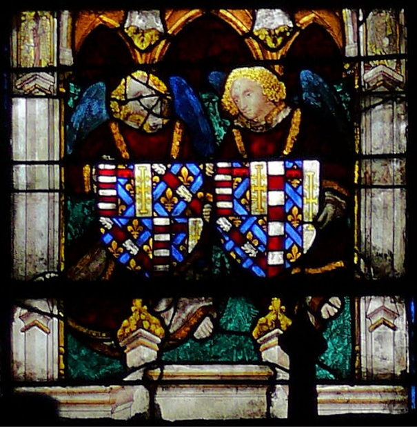 Armes de Jacques de Bourbon (gauche) et Jeanne de Naples (droite)